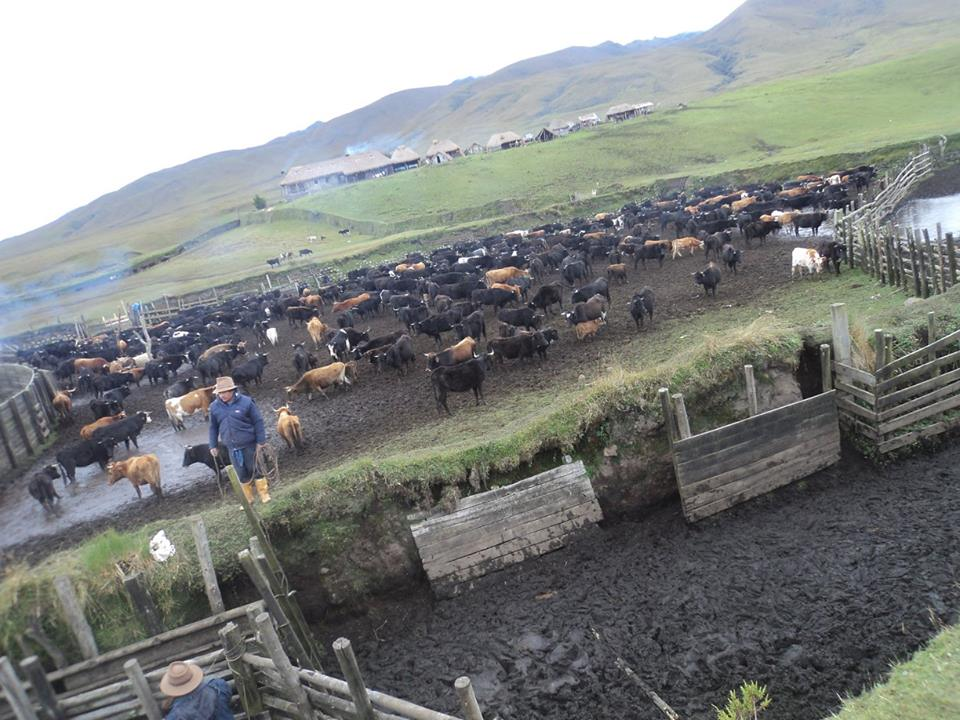 Rodeo de Chagras en la Hacienda el Tambo.